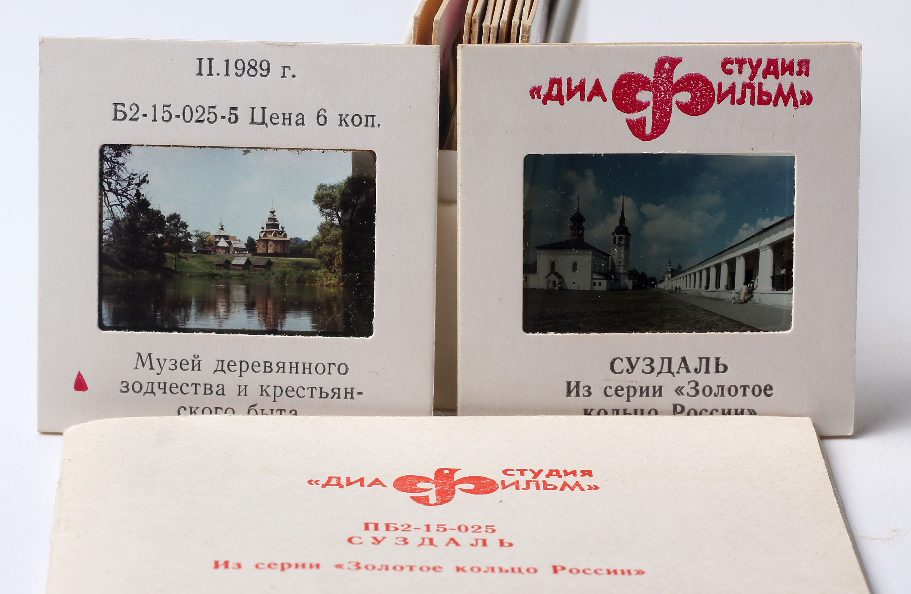 Pozityvas